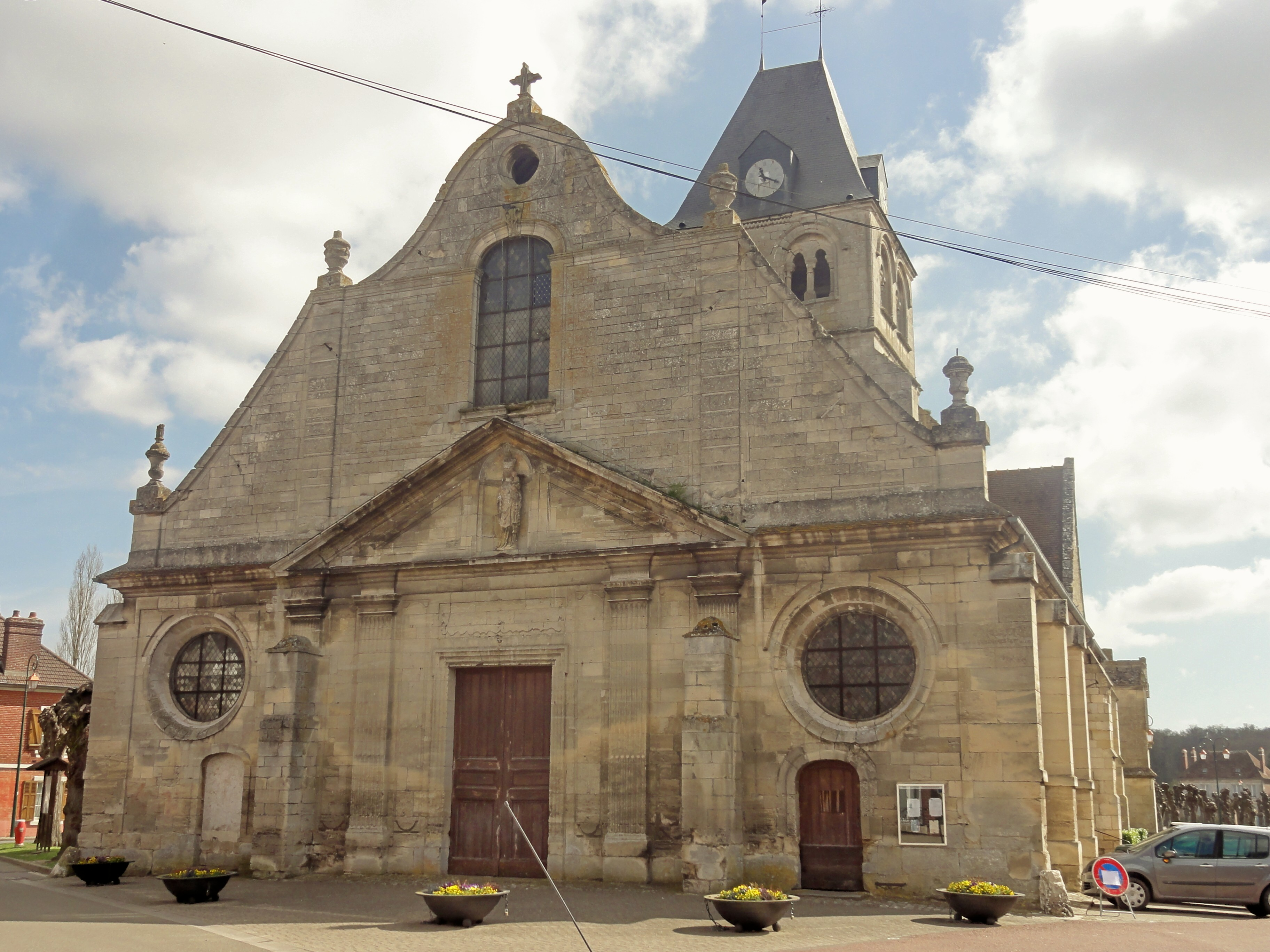 Façade occidentale de style classique.